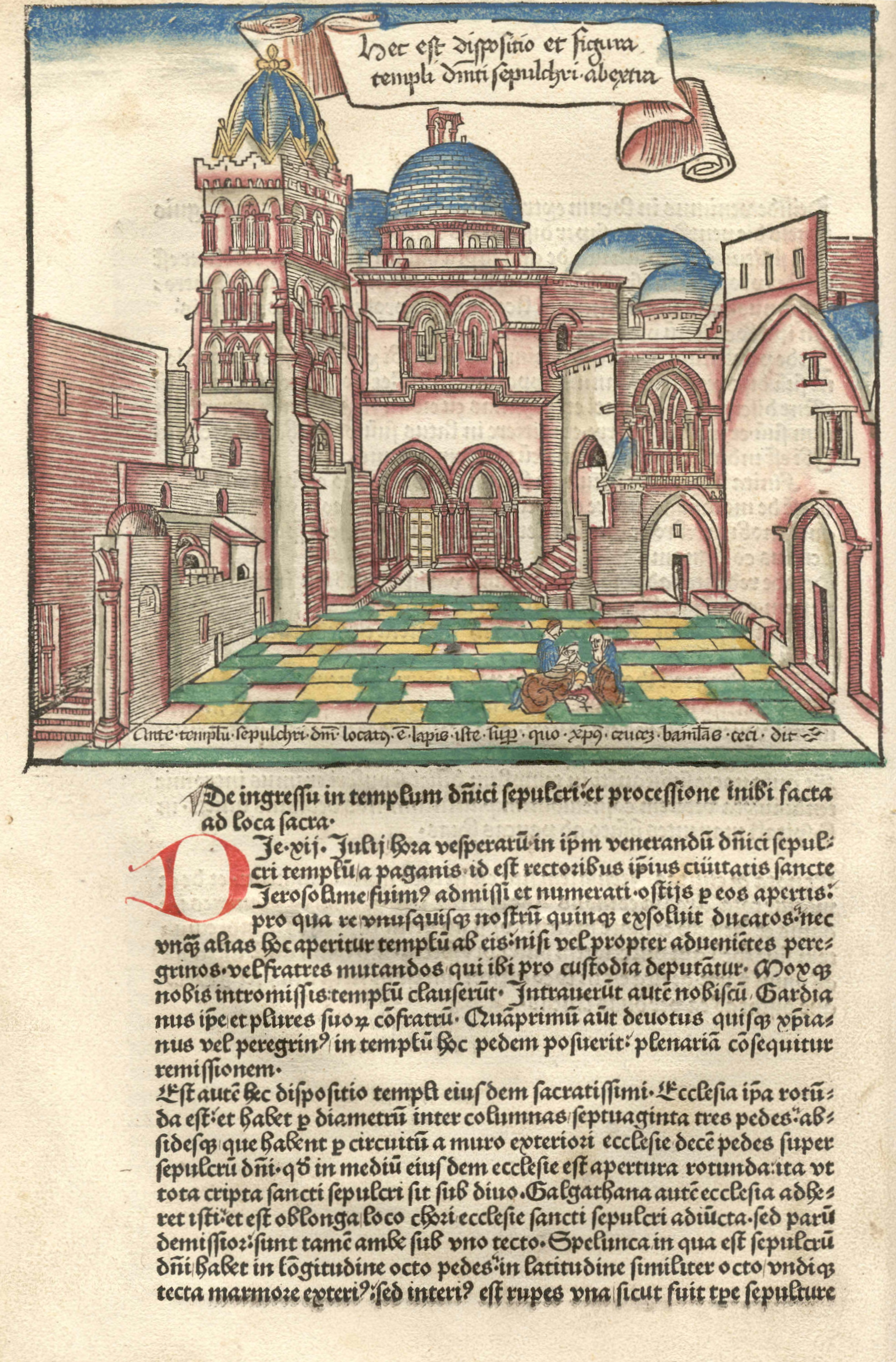 Breyden.Peregrin.kol.jpp